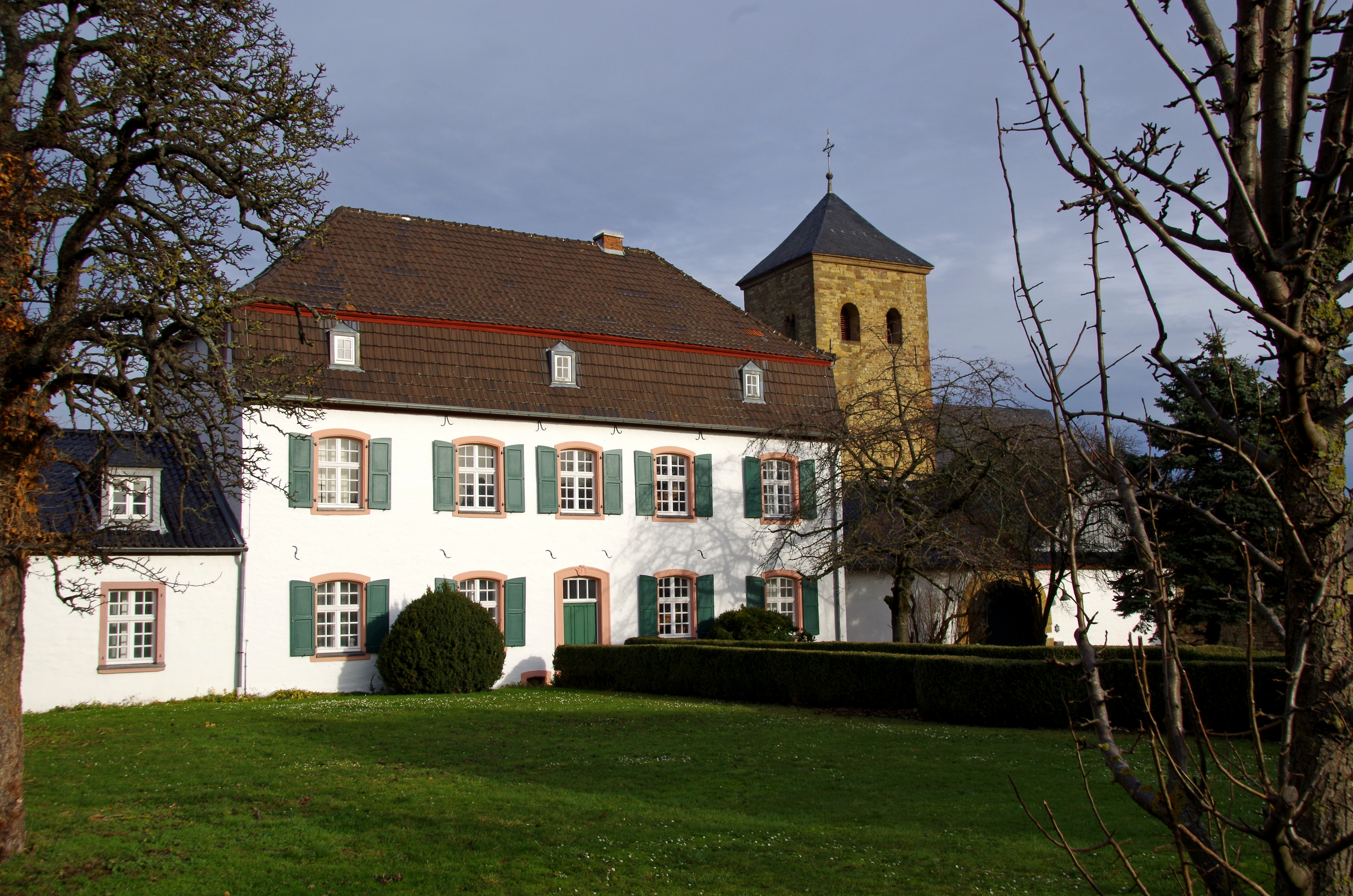 Wollersheim, Stiftshof und alte Kirche